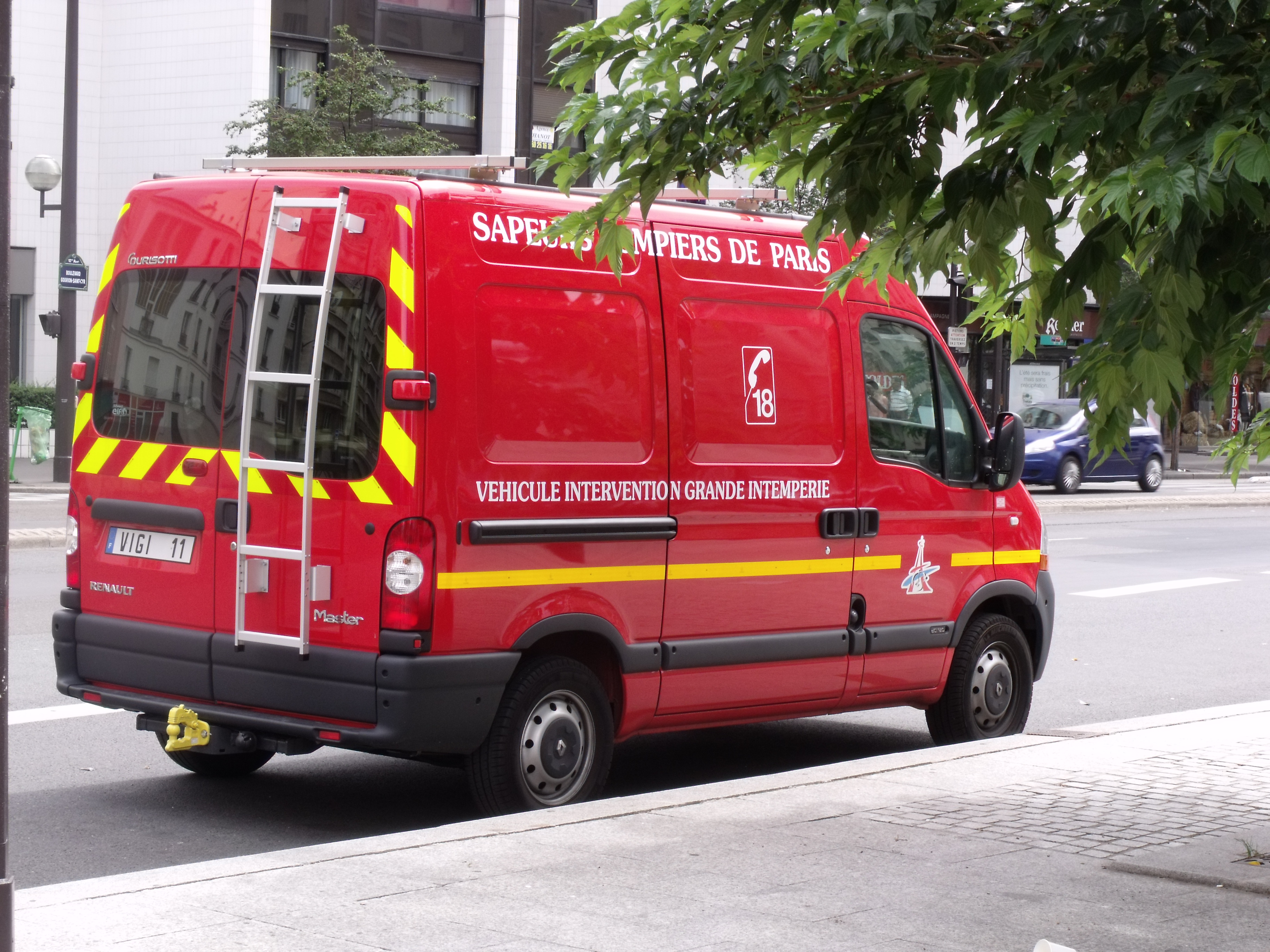 Véhicule Intervention Grande Intempérie VIGI11 appartenant à la BSPP.